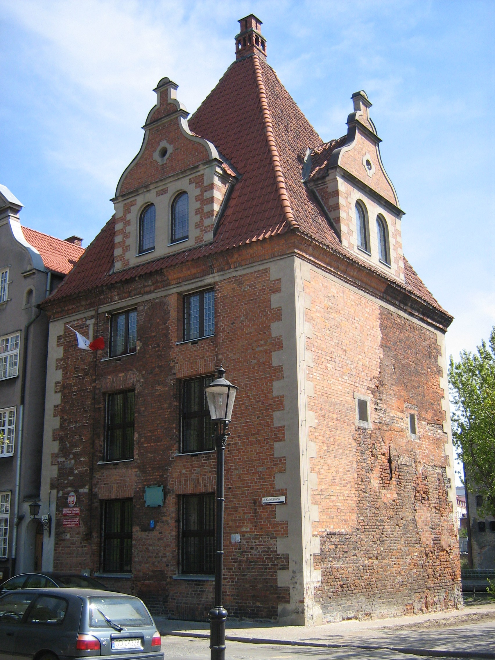 Gdańsk Główne Miasto, ul. Kotwiczników - baszta Kotwiczników, XIV, XV, XVI